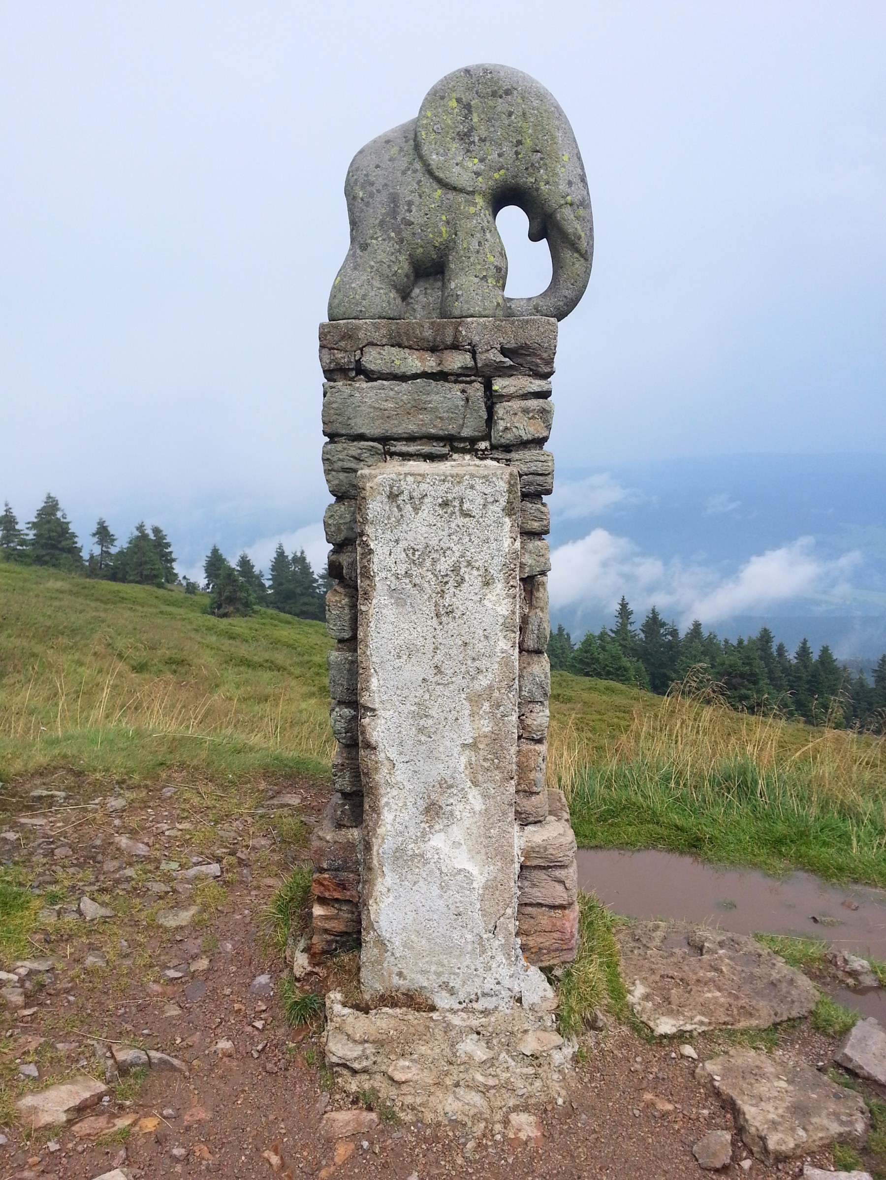 Soška slůněte z roku 1932 u bývalé Liechtensteinovy boudy pod Králickým Sněžníkem.